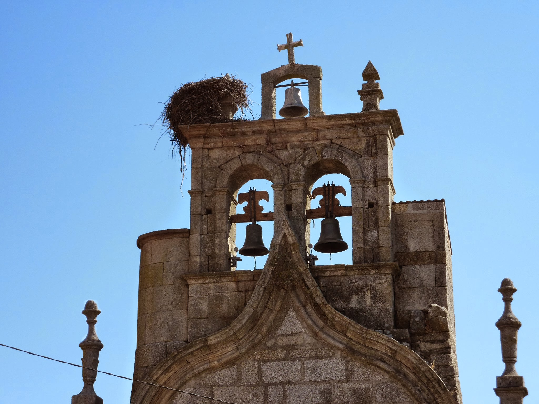 Vista trasera de el campanario de la iglesia de San Juan